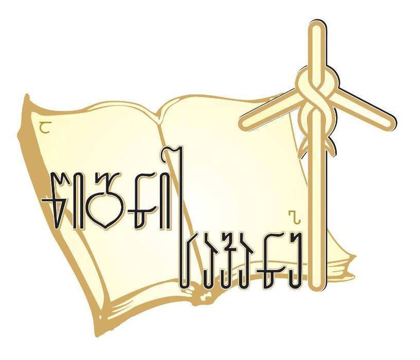 საქართველოს საპატრიარქოს ბიბლიოთეკის ლოგო